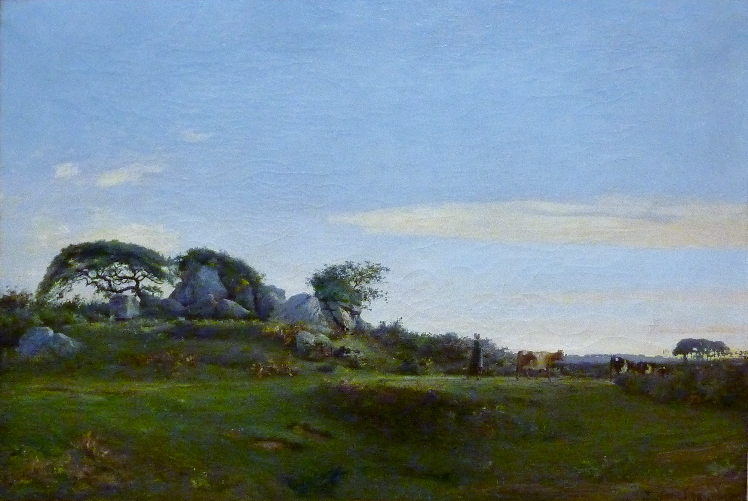 Jean-Marie Villard : Les rochers de Kerléguer (1878, Musée des beaux-Arts de Quimper) [les rochers de Kerléguer sont situés près de Douarnenez].